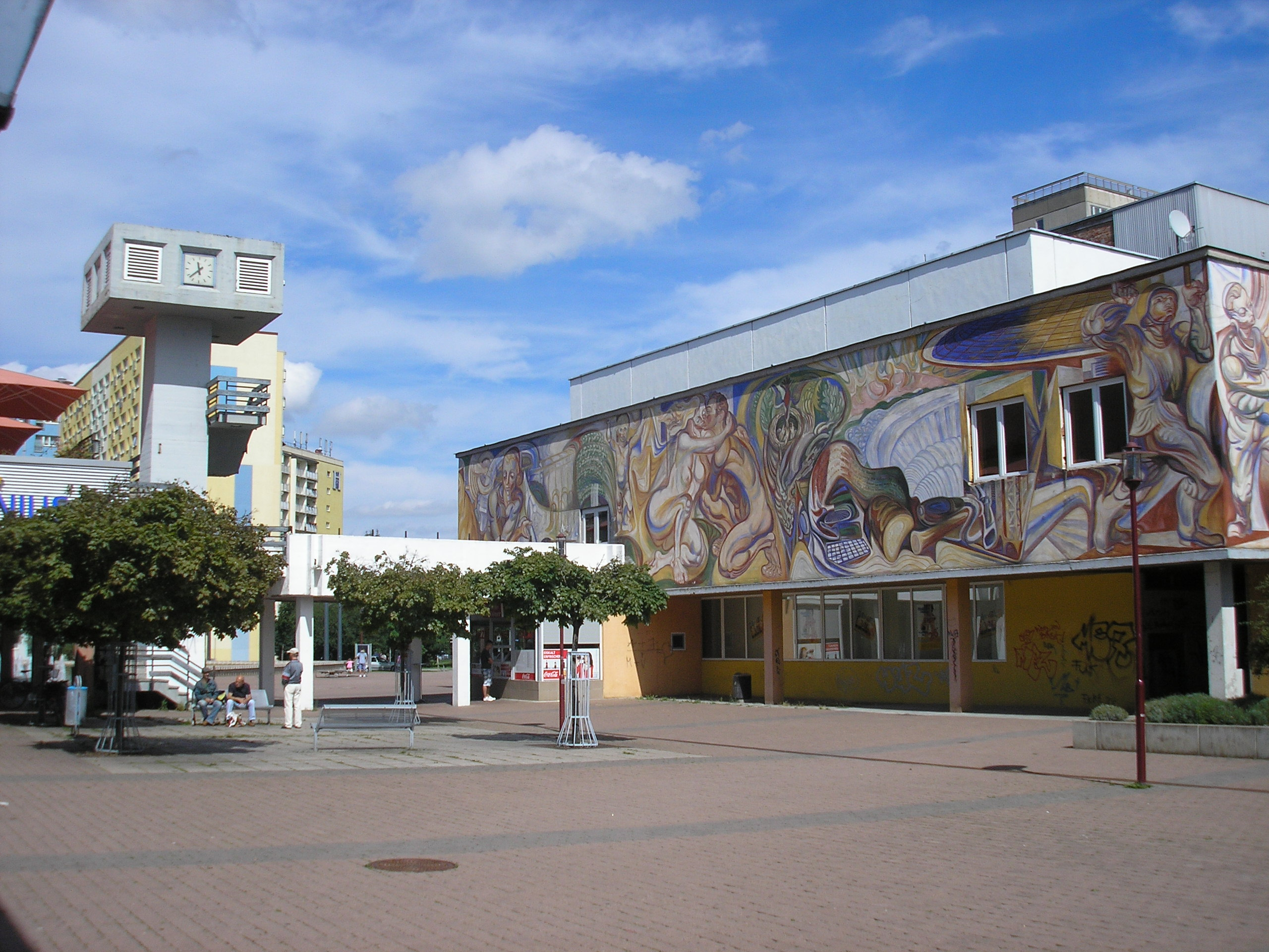 Fußgängerbereich im Erfurter Plattenbaugebiet Rieth.